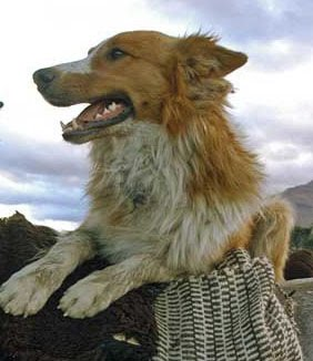 Ovejero Magallanico, raza canina chilena